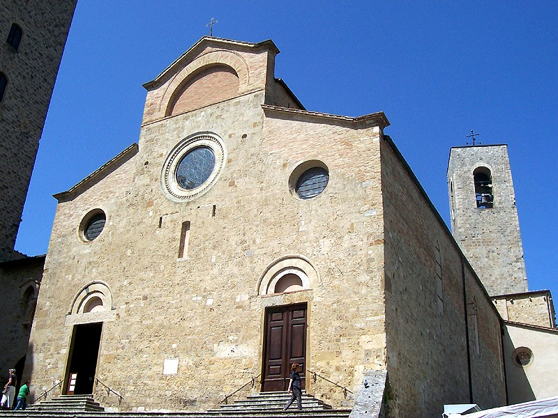 San Gimignano - Collegiata